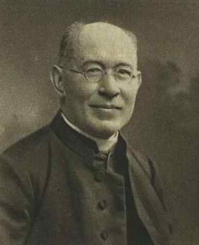 Alois Koudelka, farář a překladatel, 1941